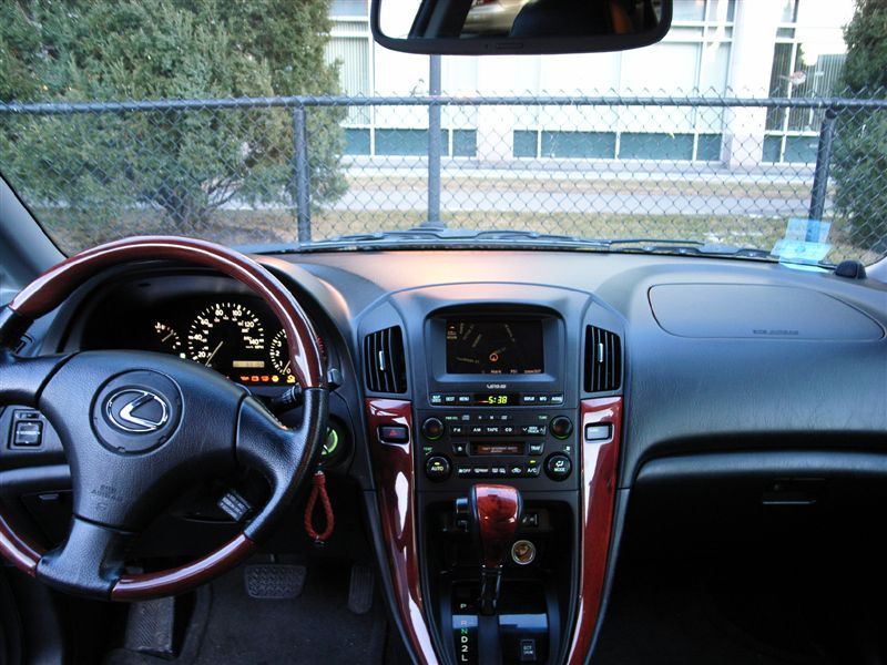 first gen Lexus RX